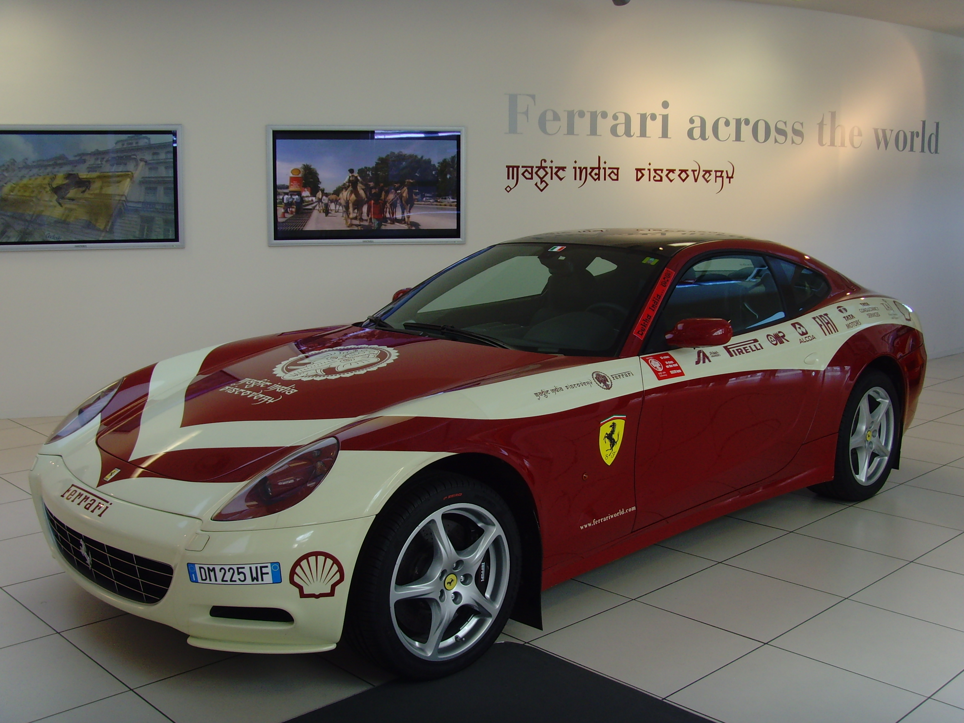 Galleria Ferrari